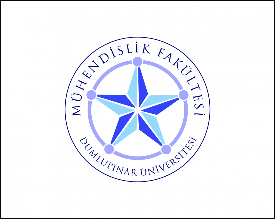 Dumlupınar Üniversitesi Mühendislik Fakültesi Logo